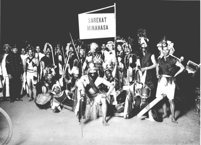 Foto. Aangeboden aan Zijne Excellentie den Gouverneur-Generaal van Nederlandsch-Indië ter gelegenheid van de opening der Rechts Hoogeschool te Batavia. Tjakaleleh dansers ter gelegenheid van de opening van de rechtshogeschool